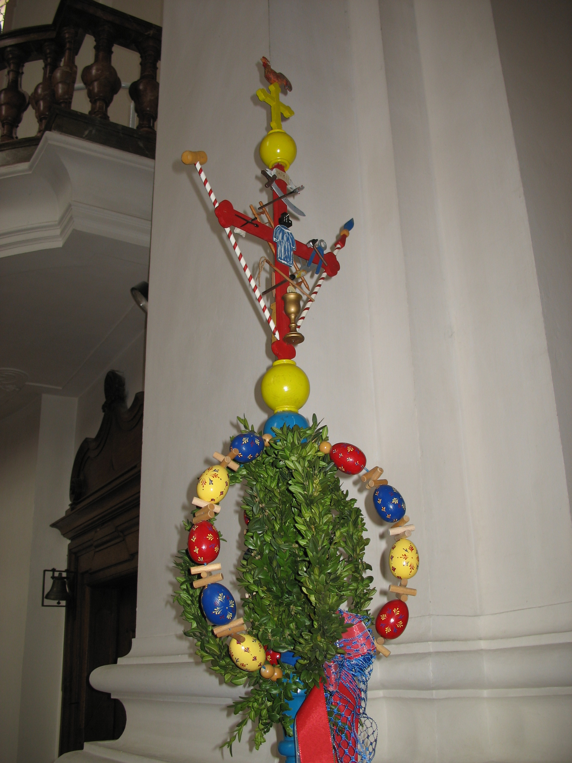 Palmstock, "Palmen" in Oberschwaben (Wallfahrtskirche Steinhausen, 2006)